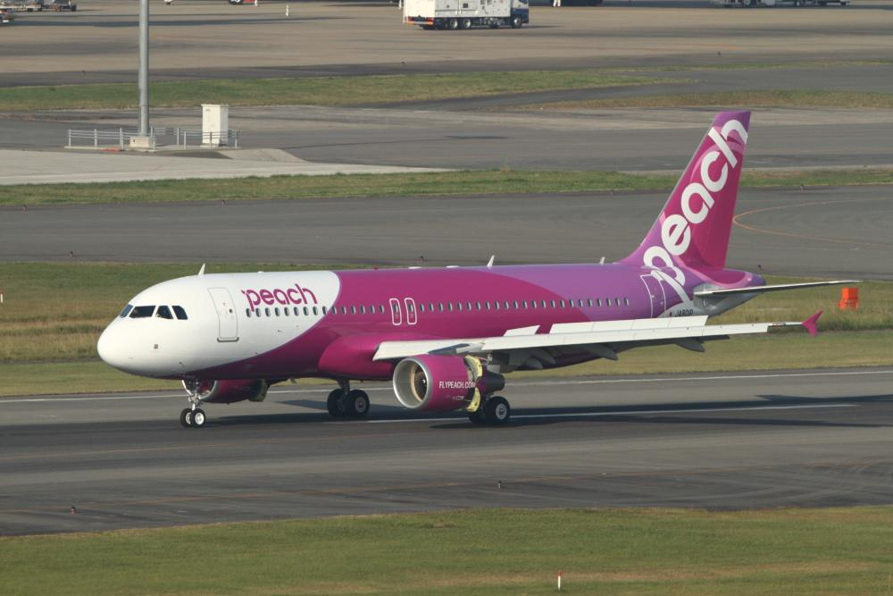 Peach Aviation の航空機。（関西空港で撮影）